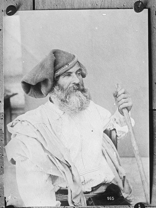 Imatge